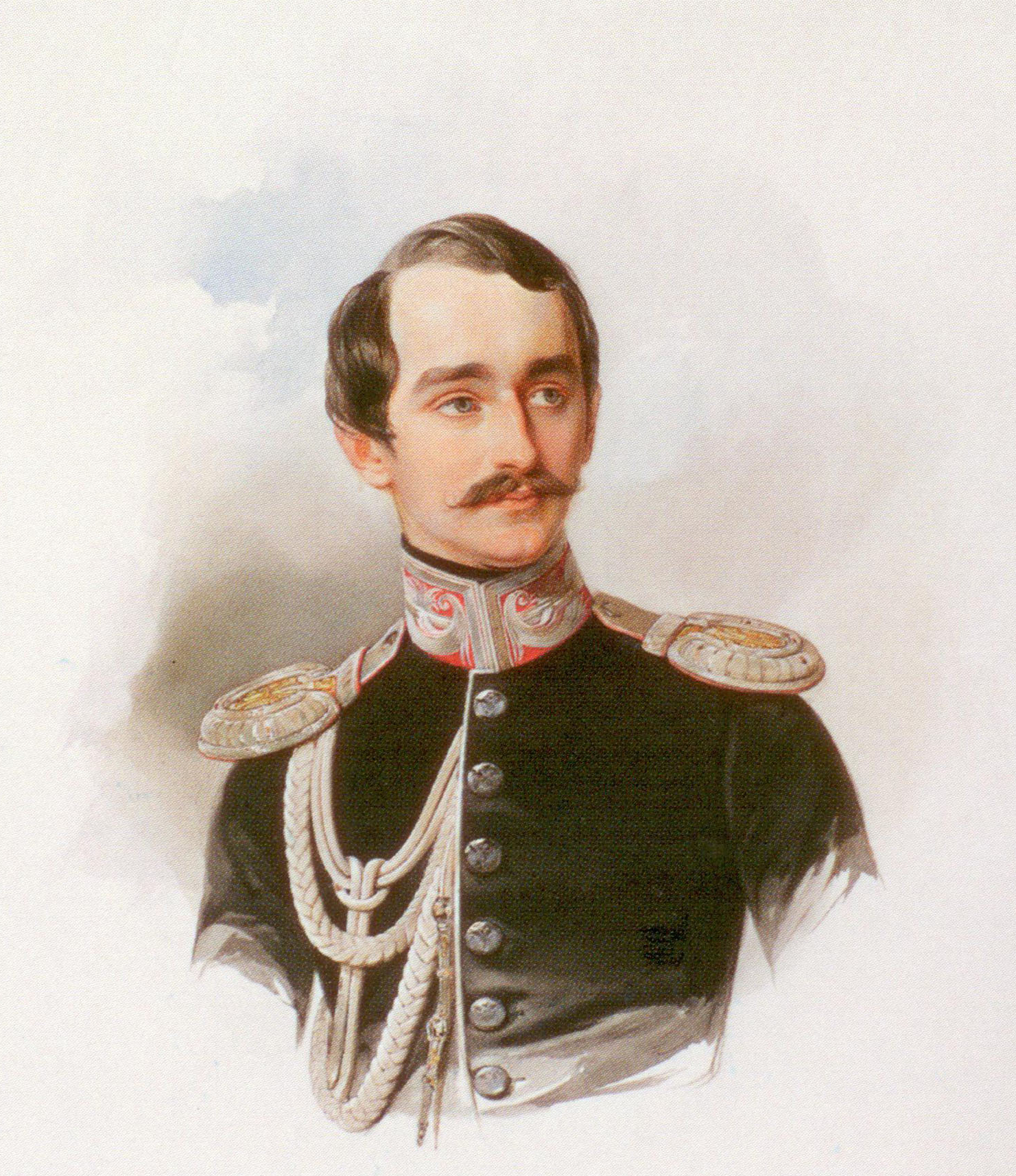 Граф Николай Алексеевич Орлов (1827-1885)